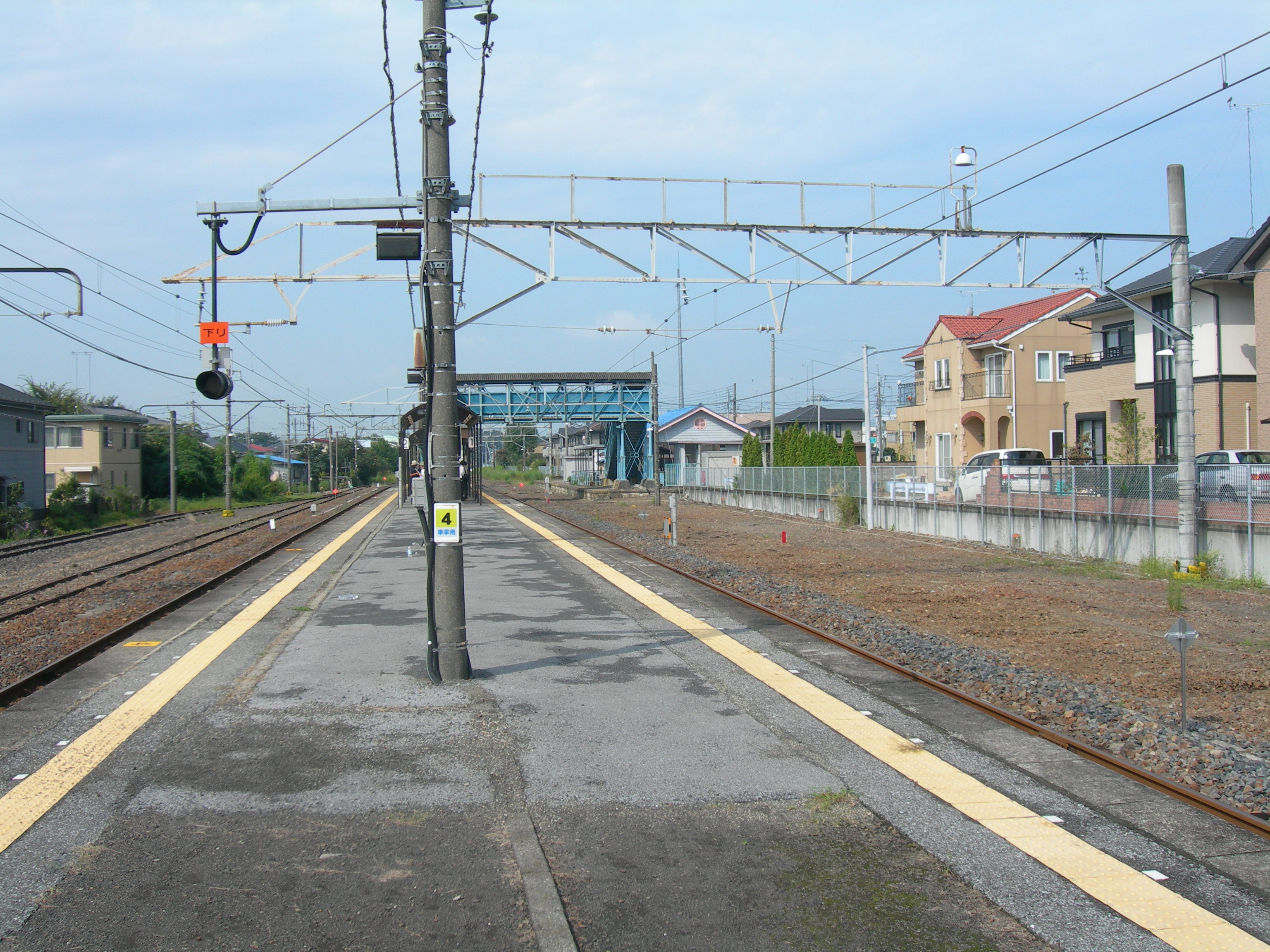 鶴田駅ホーム